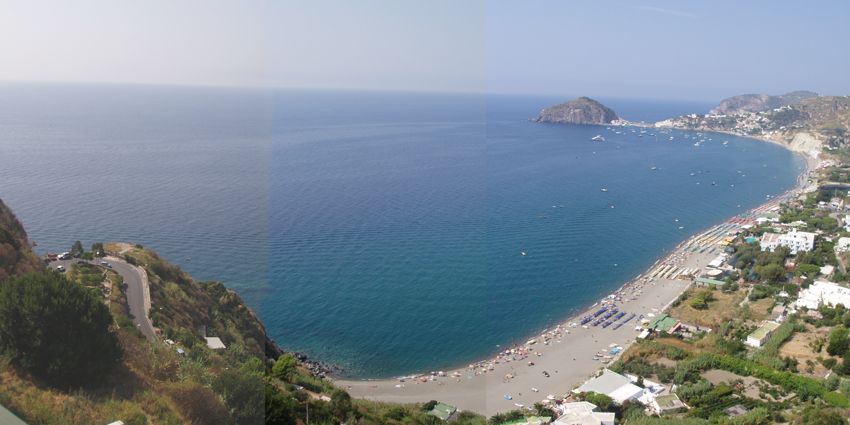 Isola di Ischia - Spiaggia dei Maronti (comune di Barano d'Ischia). In fondo Sant'Angelo (Serrara Fontana).